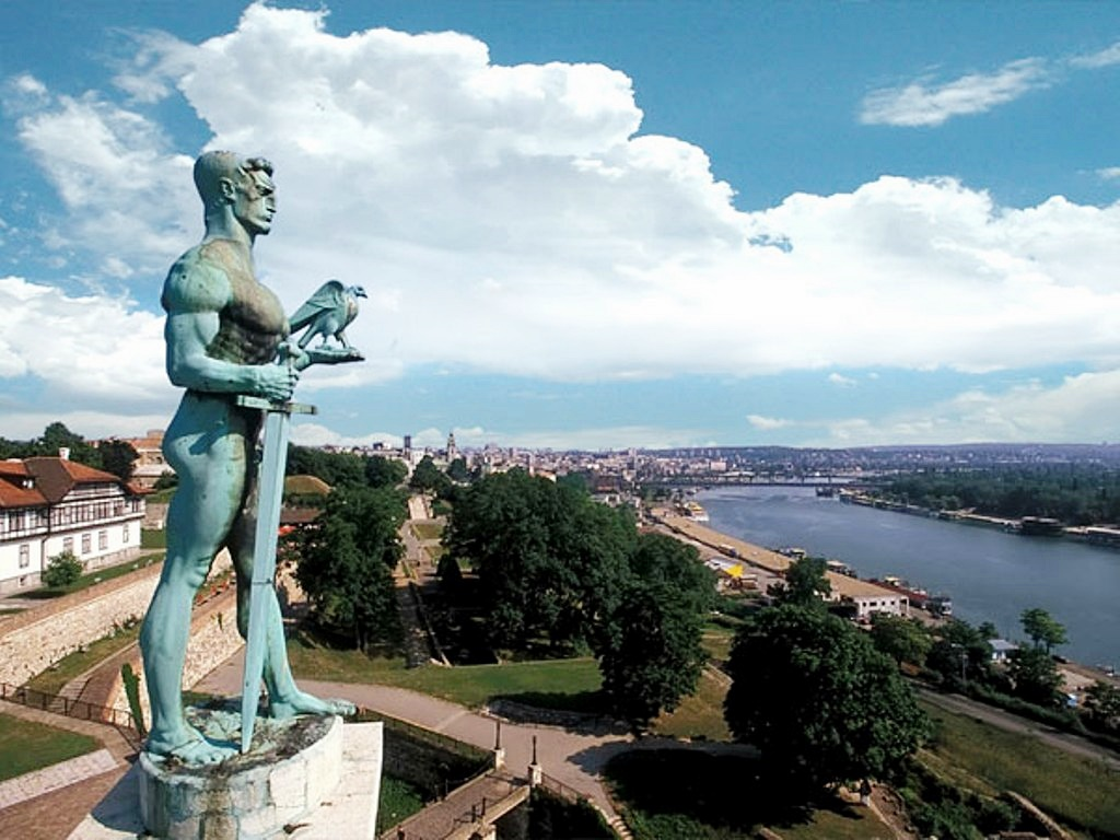 Le vainqueur en statue